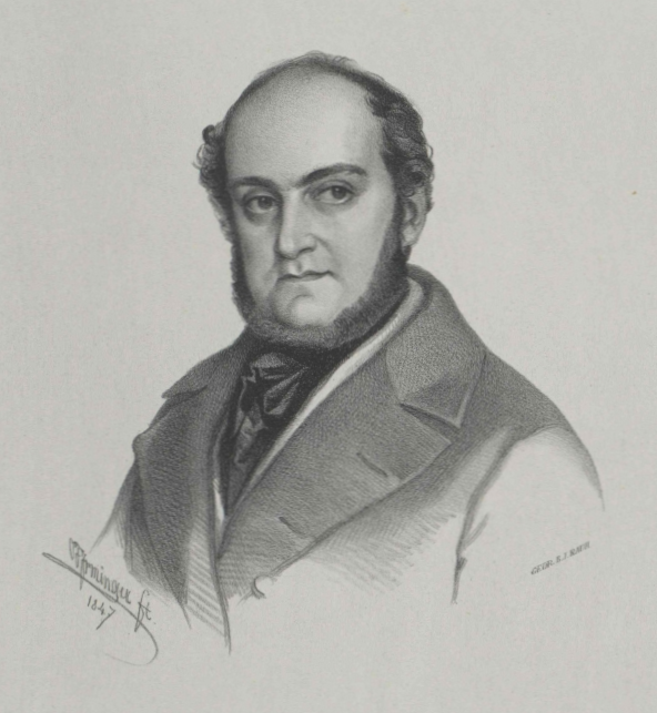 Theodor von Karajan.Lithographie auf aufgewalztem China. Im Stein signiert: CFIrminger 1847.Maße des Originals: Bildgröße: 160 x 140 mm. Blattgröße: 435 x 353 mm. Verlag: GEDR. B. J. RAUH (d. i. Johann Rauh, Steindrucker in Wien 1803–1863)